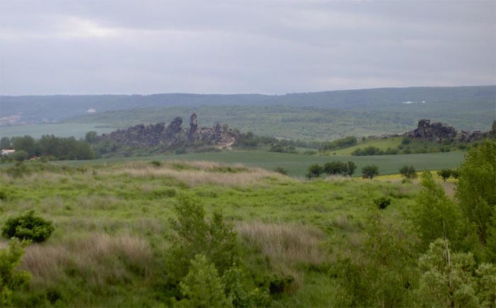 Rumpffläche und Teufelsmauer im mittleren Harz Andere Versionen